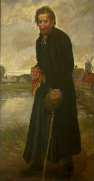 Poetas Antanas Strazdas. 1877 M. K. Čiurlionio dailės muziejus